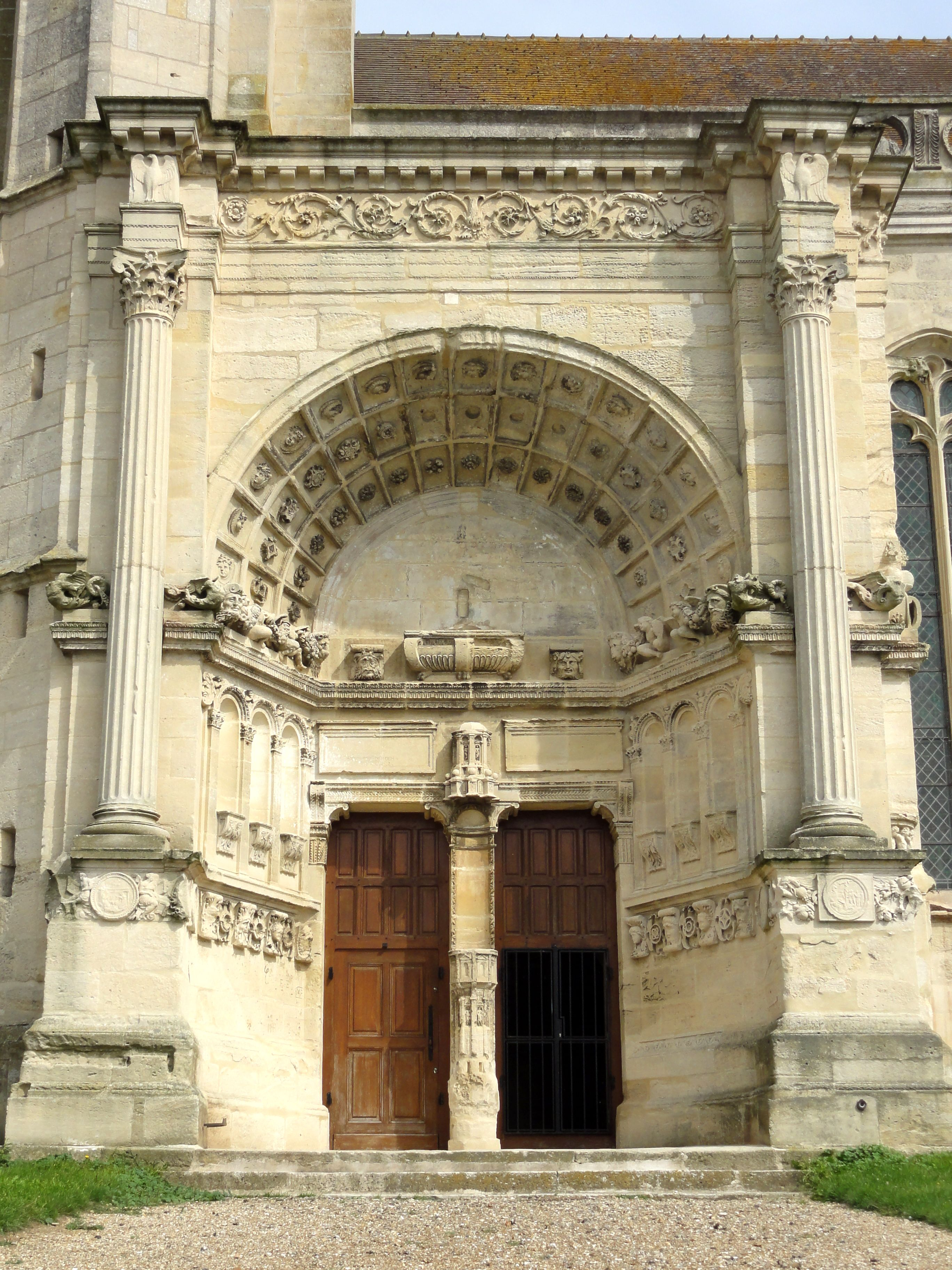 Portail.